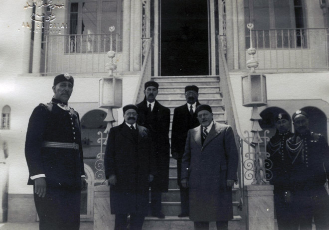 Marches du palais de la Marsa : Hédi Lakhoua (grand vizir) au premier plan à droite, Abdeljelil Zaouche (ministre de la Justice) au second plan à droite et Ahmed Berrais (ministre de la Plume)